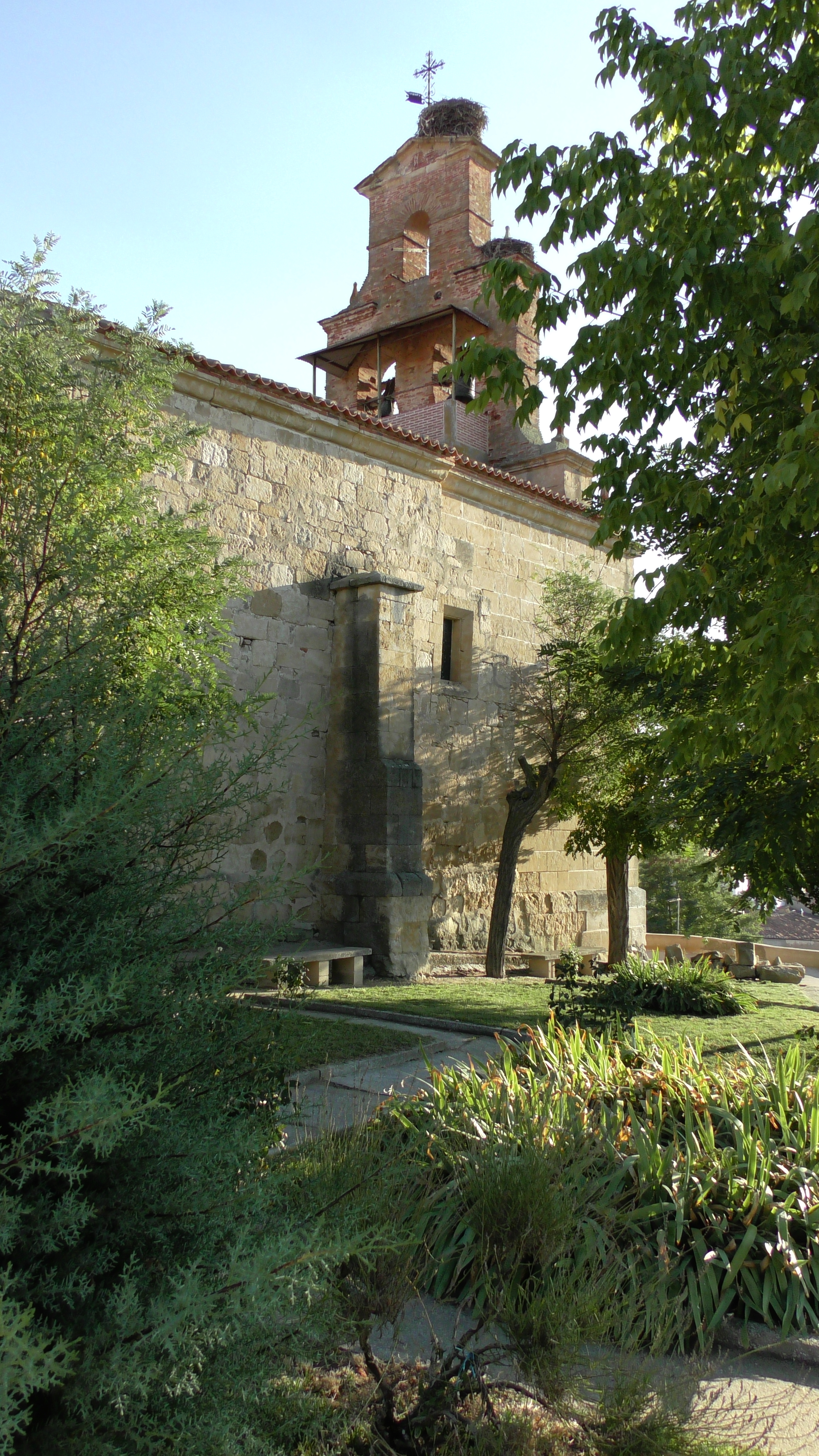 El Piñero